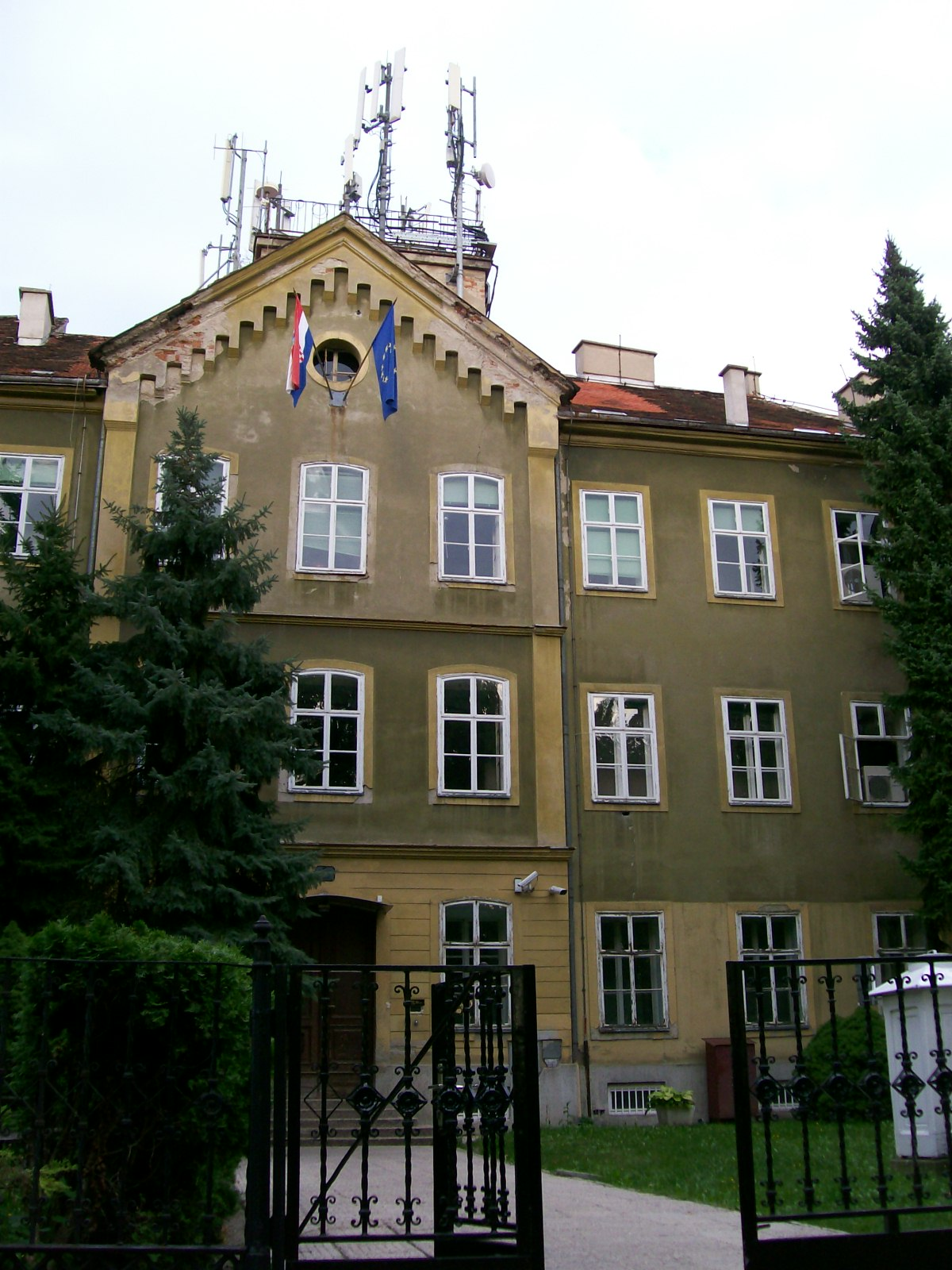 Državni hidrometeorološki zavod Grič, Zagreb